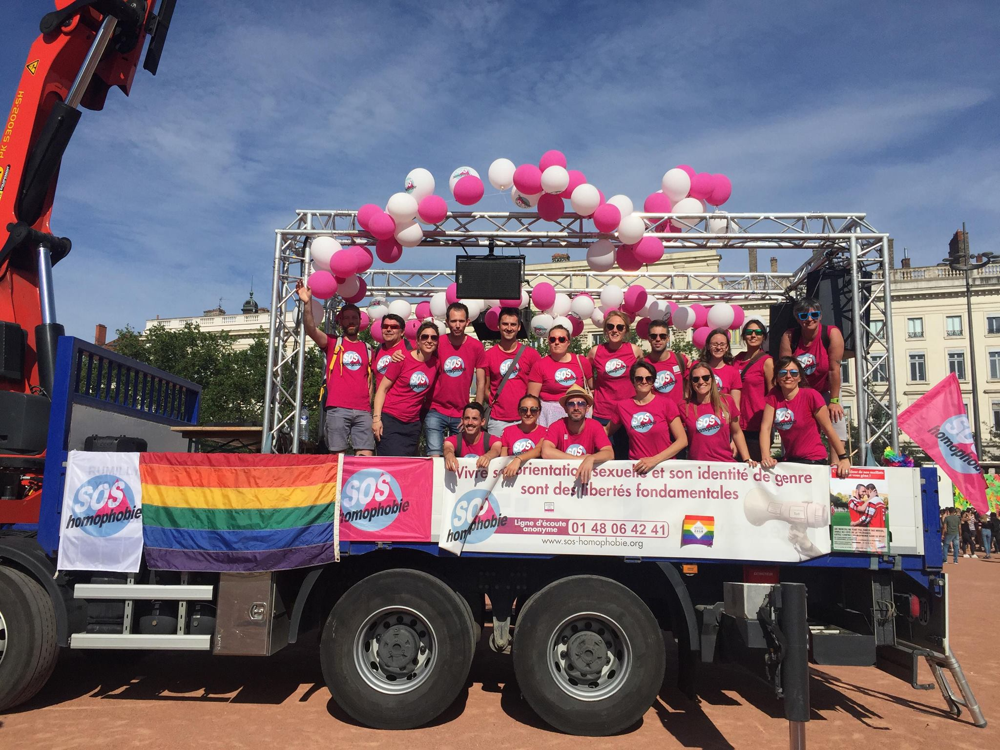 SOS homophobie à la Marche des fiertés de Lyon en 2018